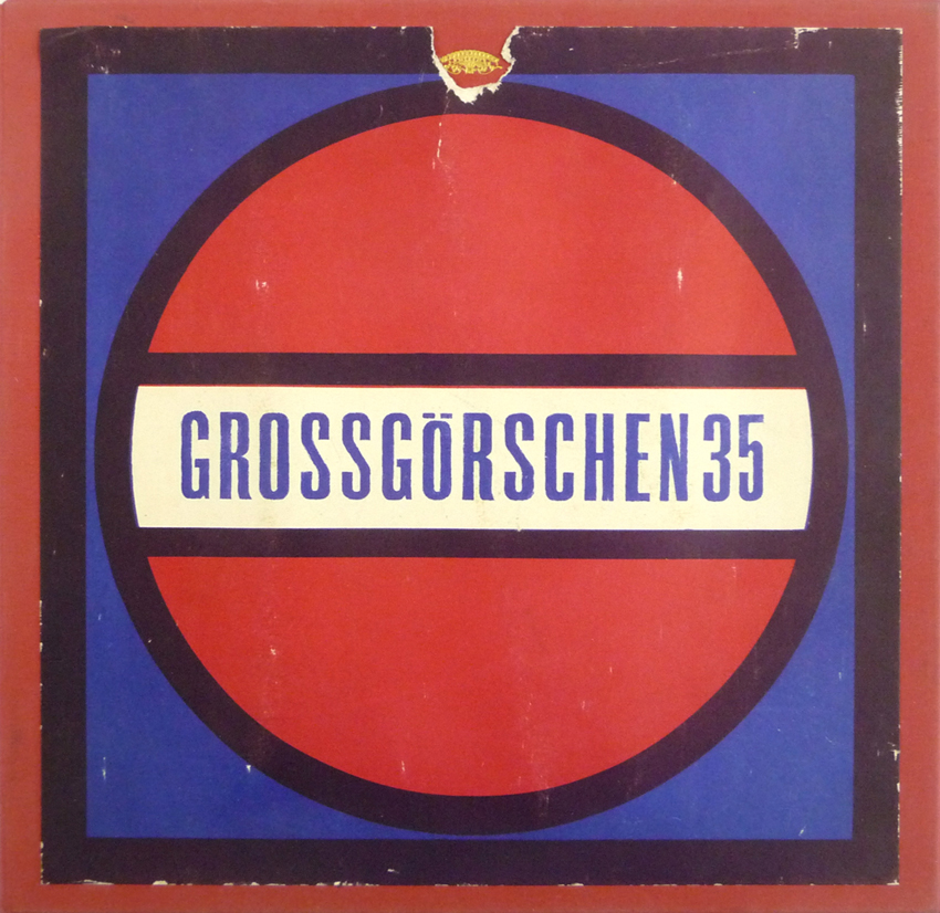 Großgörschen 35 Leinen-Kassette, 32 x 33 cm, 12 signierte, datierte und nummerierte Originalgrafiken, Auflage: 50/50, 25 é. a., Berlin 1966 Grafiken von Ulrich Baehr, Werner Berges, Hans Jürgen Burgaller, Hans-Jürgen Diehl, Leiv Warren Donnan, Hans-Georg Dornhege, Eduard Franoszek, Franz-Rudolf Knubel, Reinhard Lange, Wolfgang Petrick, Peter Sorge, Arnulf Spengler